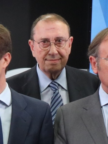 Conferencia Pablo Casado en La Razón.